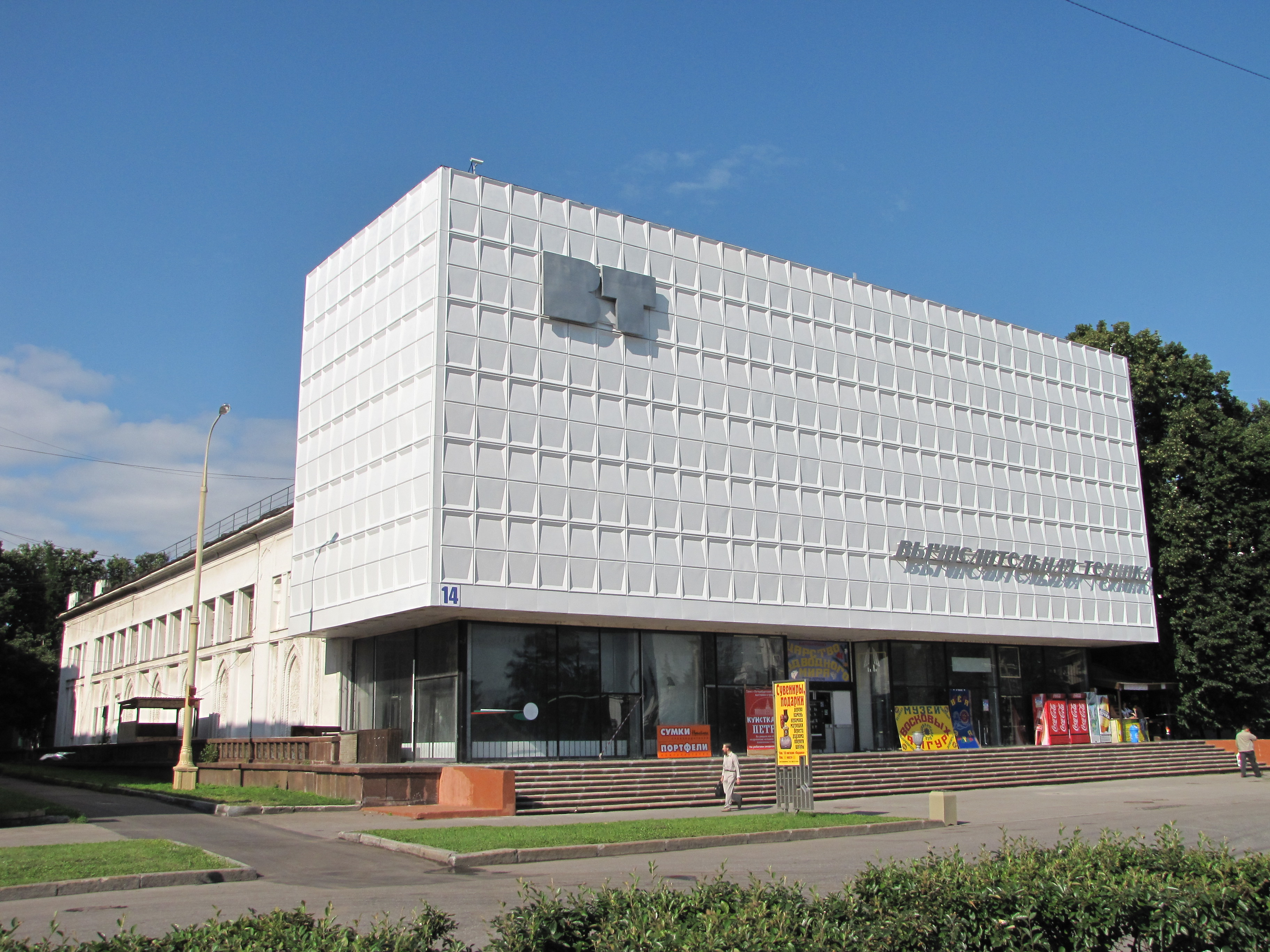 за кубом фасада скрывается исторический фасад павильона